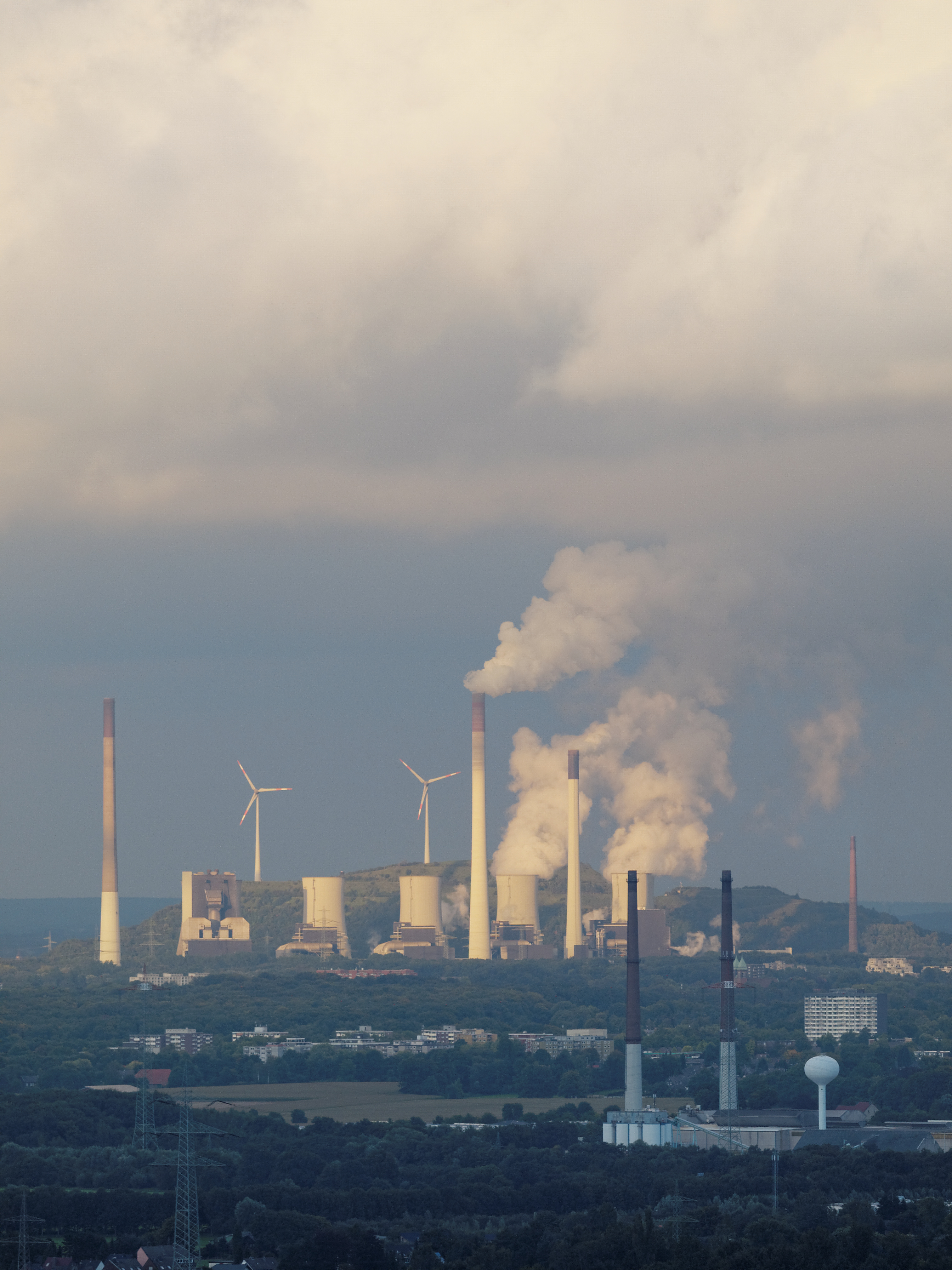 Ausblick von der Halde Haniel in Bottrop nach Osten auf das Kraftwerk Scholven in Gelsenkirchen-Scholven.